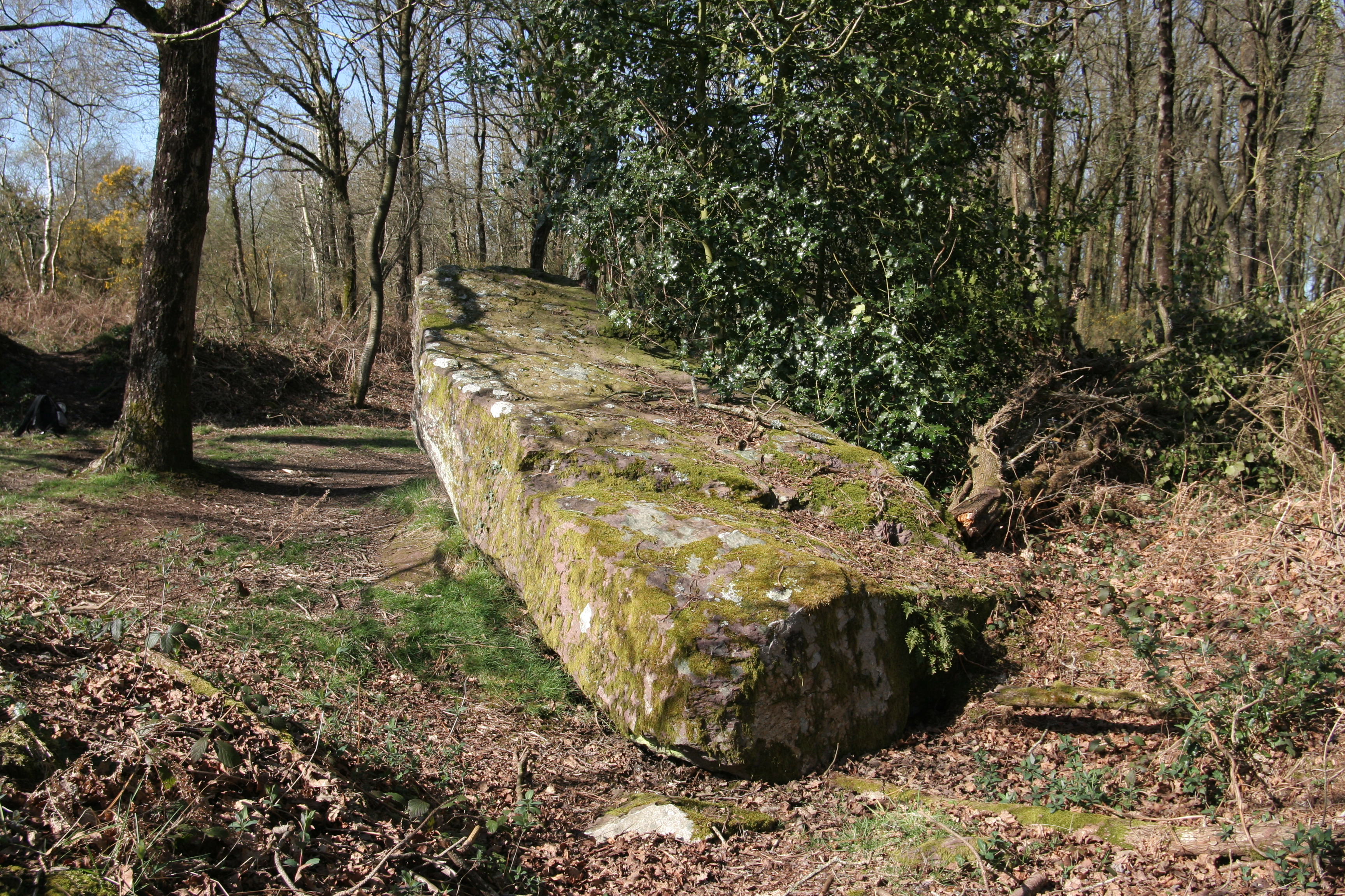 Menhir couché de La Roche-qui-Chôme, Laillé (Ille-et-Vilaine, Bretagne, France).